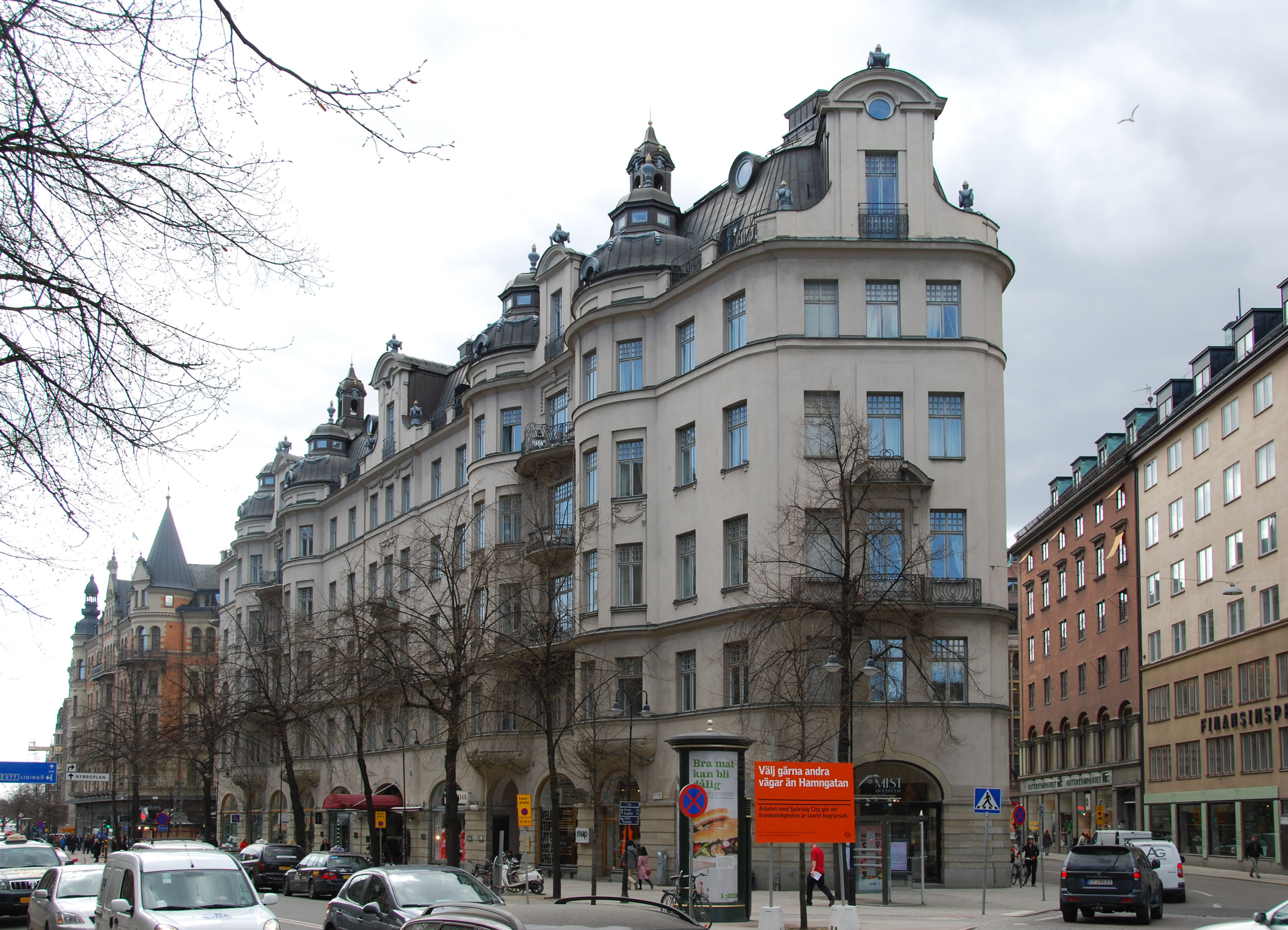 Birger Jarlsgatan 21, 23, Stockholm. Byggt 1903.